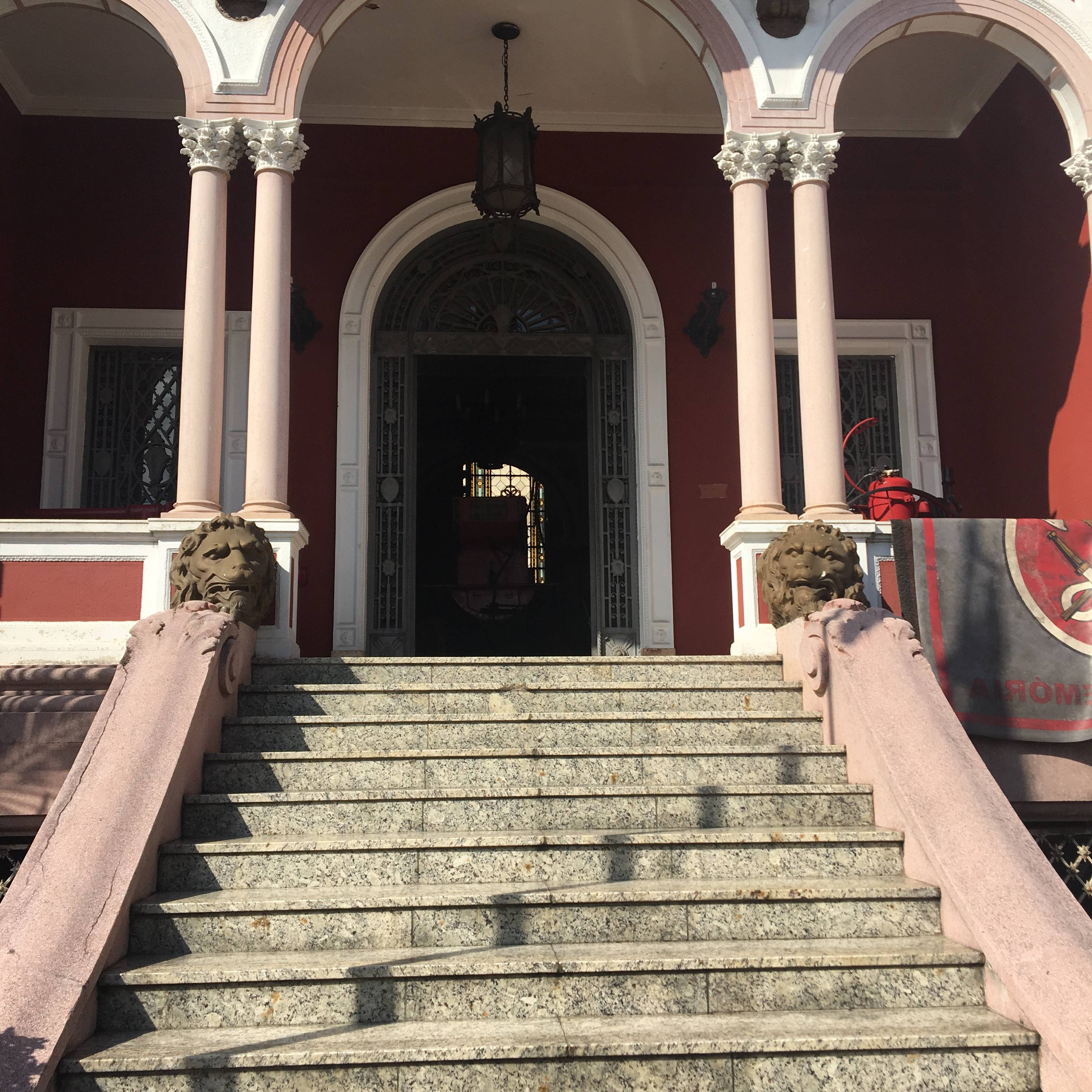 entrada